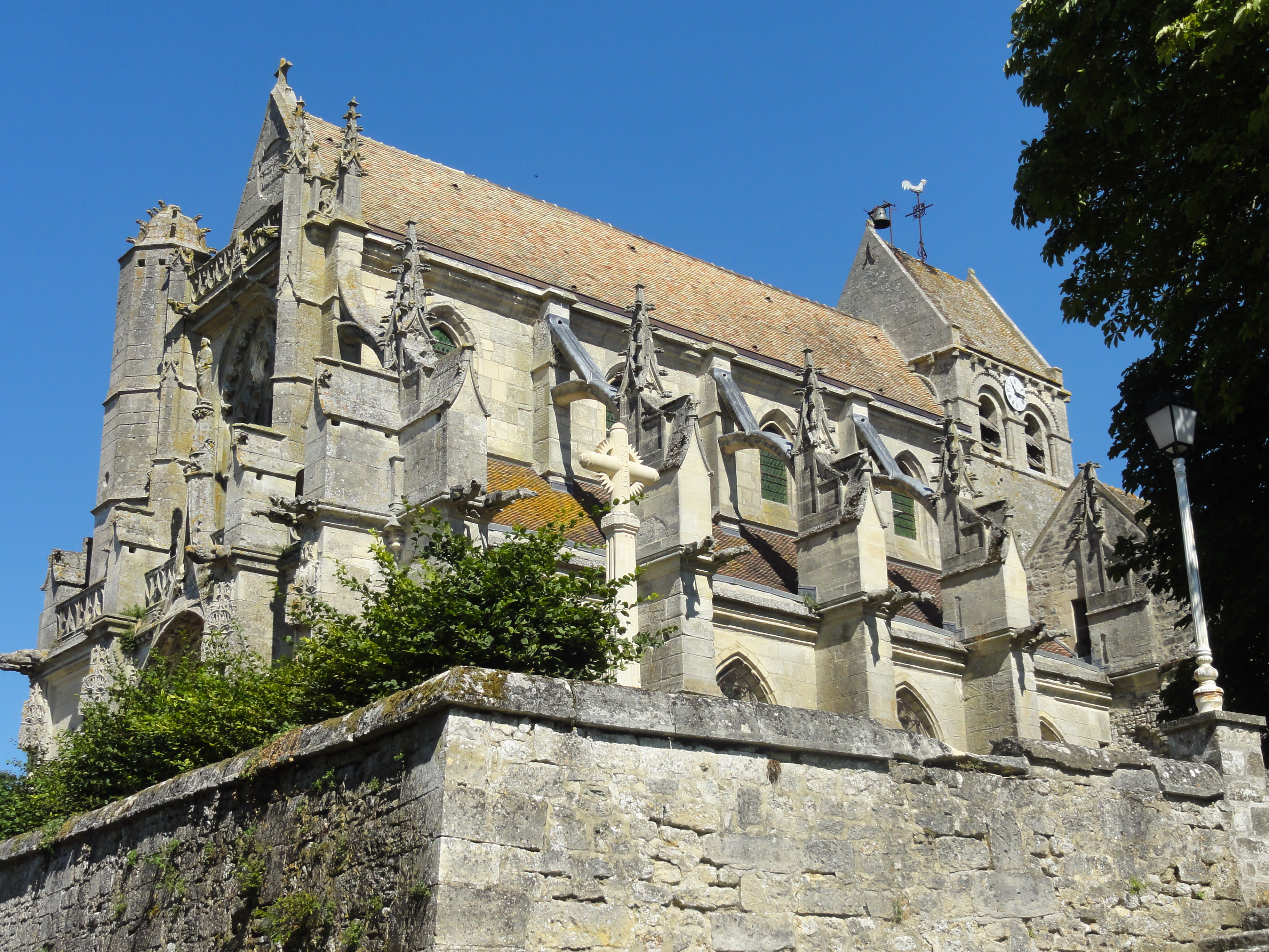 Église Saint-Denis de Serans - voir titre.